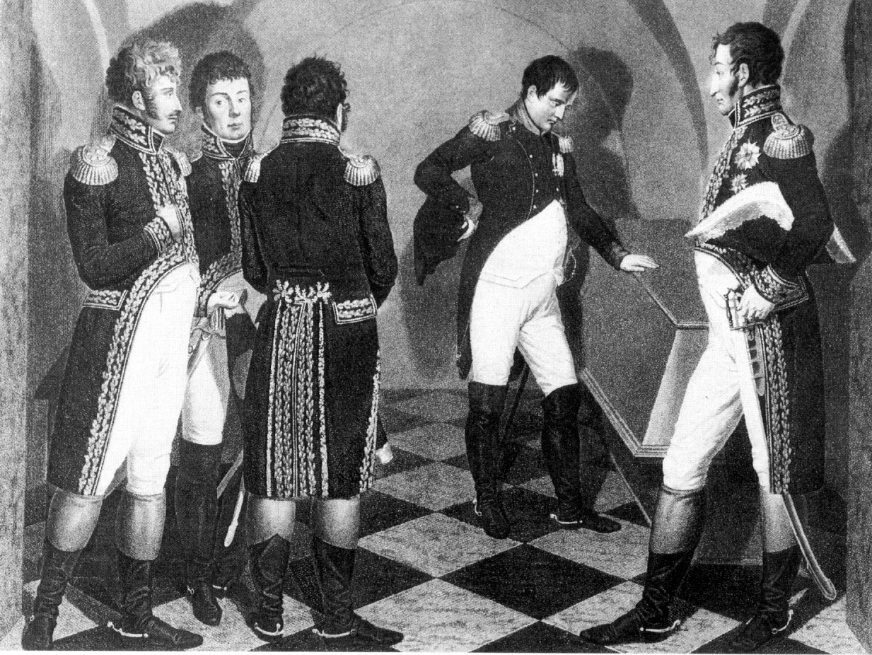 Napoleon Bonaparte in Potsdam am Grab Friedrichs II. 1806 in der Garnisonkirche